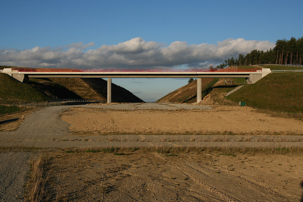 Zukünftiger Bahnhof von Ilmenau an der Schnellfahrstrecke Nürnberg–Erfurt.